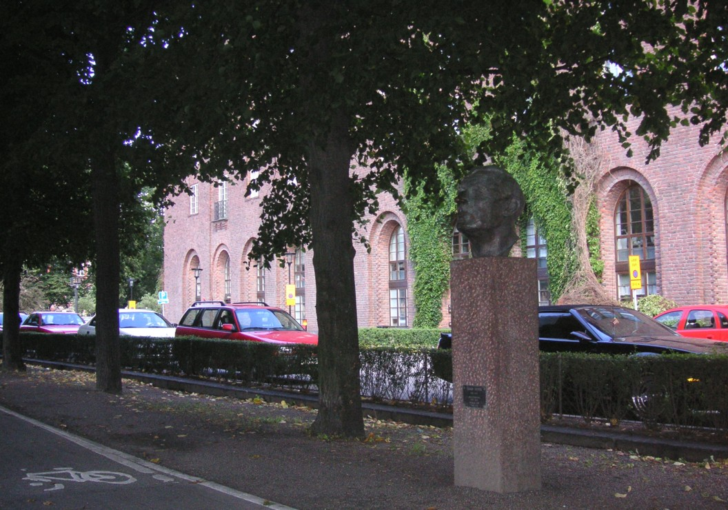 Ragnar Östbergs plan i Stockholm